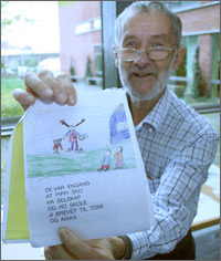 En av mange bøker, Arne Trageton viser frem på kurs, skrevet av barn gjennom "å skrive seg til lesning" prosjektet. Hvorfor skal barn lese andres bøker som de ikke har noe forhold til, når de kan lære mye bedre og raskere av å skrive selv?